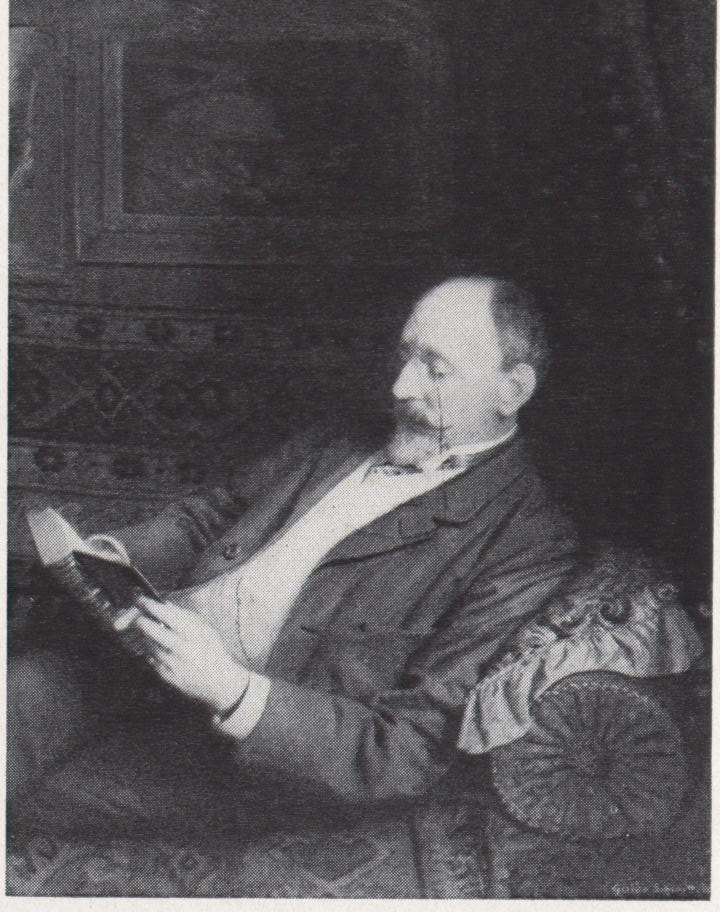 Nathanael Schmitt, Heidelberger Maler, portraitiert von seinem Bruder Guido Philipp Schmitt